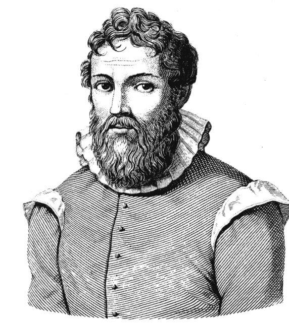 Ostilio Ricci (1540-1603), incisione